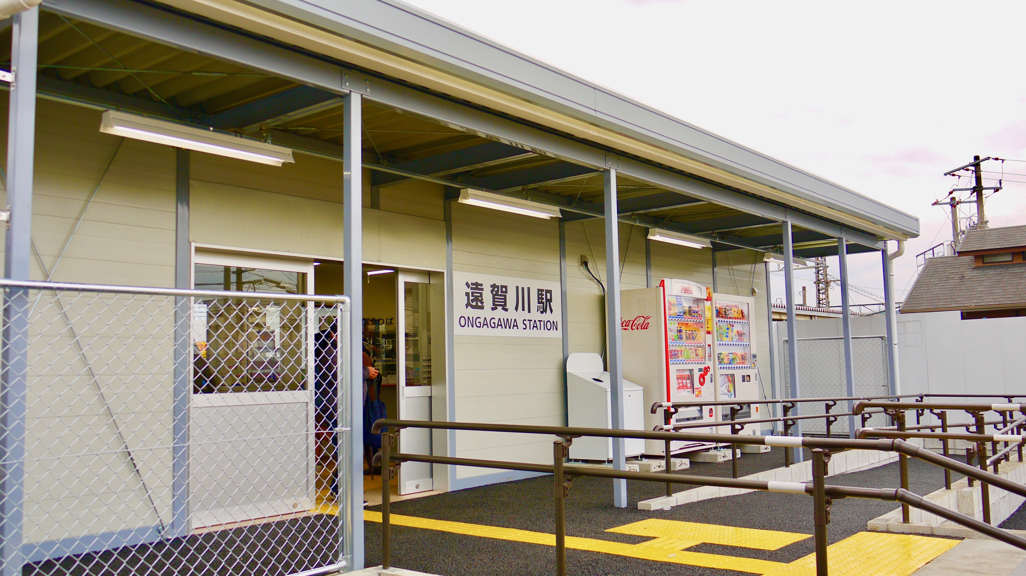 2017年の12月9日に全焼後、新しく開設された。